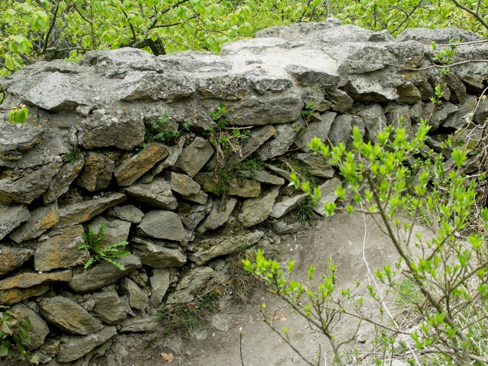 Ruine Hohenkrähen, Fischgrätenmauer.